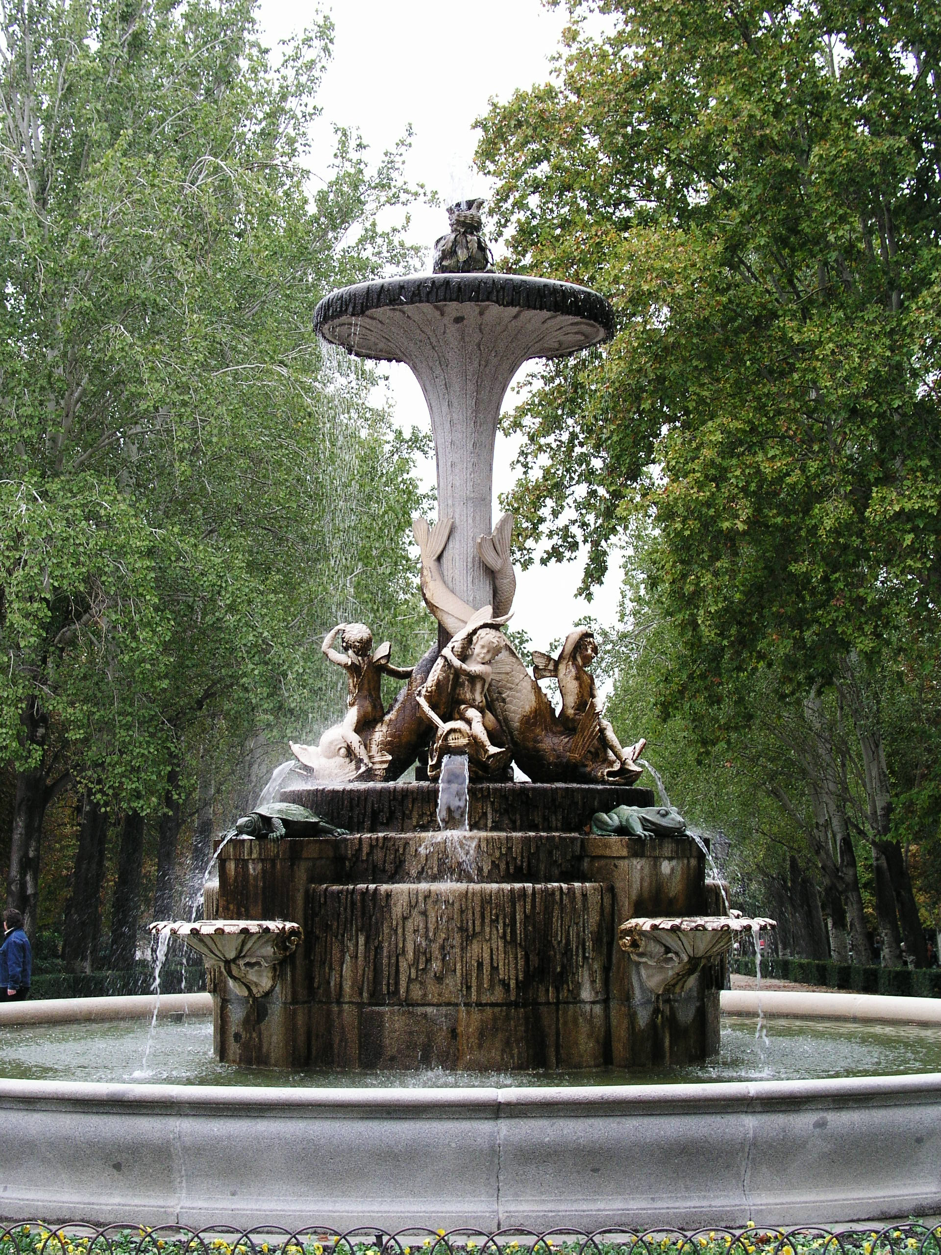 Fuente de los Galápagos, Jardines del Buen Retiro, Madrid, Spain